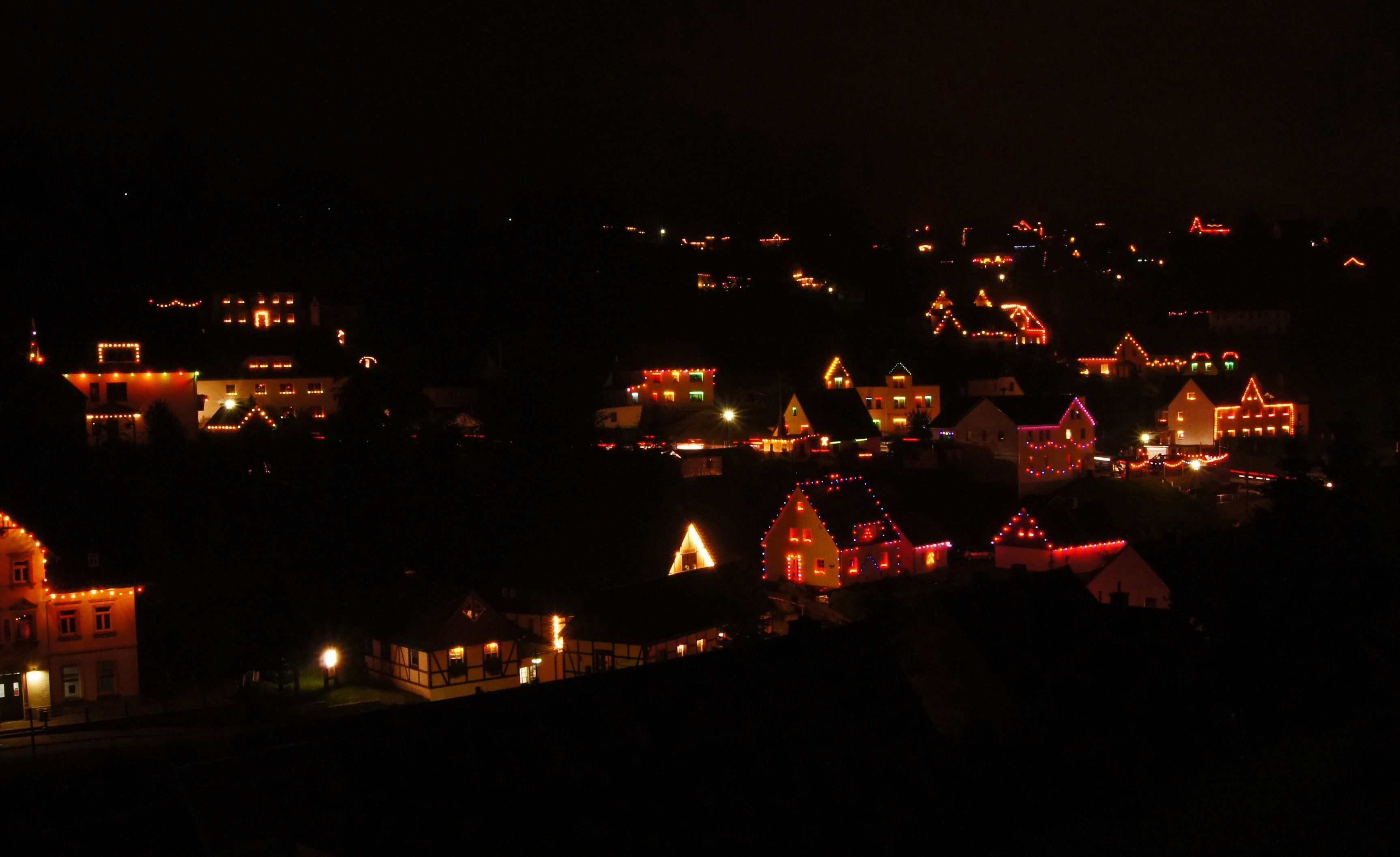 illuminierte Häuser der Amtsseite von Pobershau